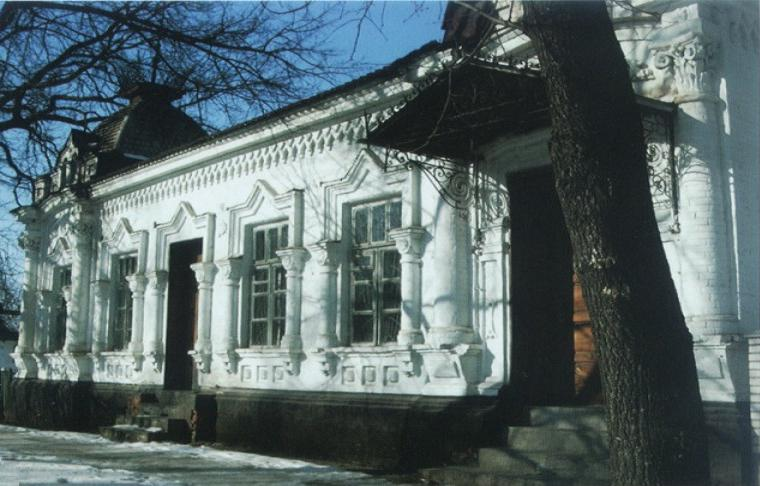 Тараща - будинок депутата Державної Думи царської Росії Макарія Дяковського: Тараща - будинок депутата Державної Думи царської Росії Макарія Дяковського